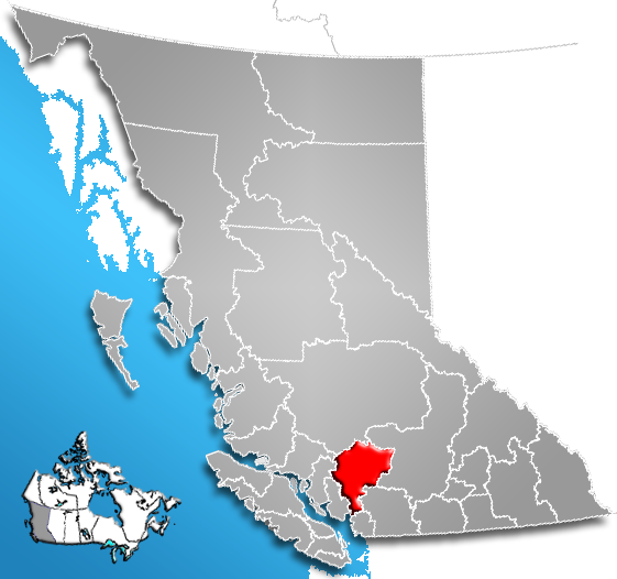 Distrito Regional de Greater Vancouver Location of Squamish-Lillooet Regional District, British Columbia